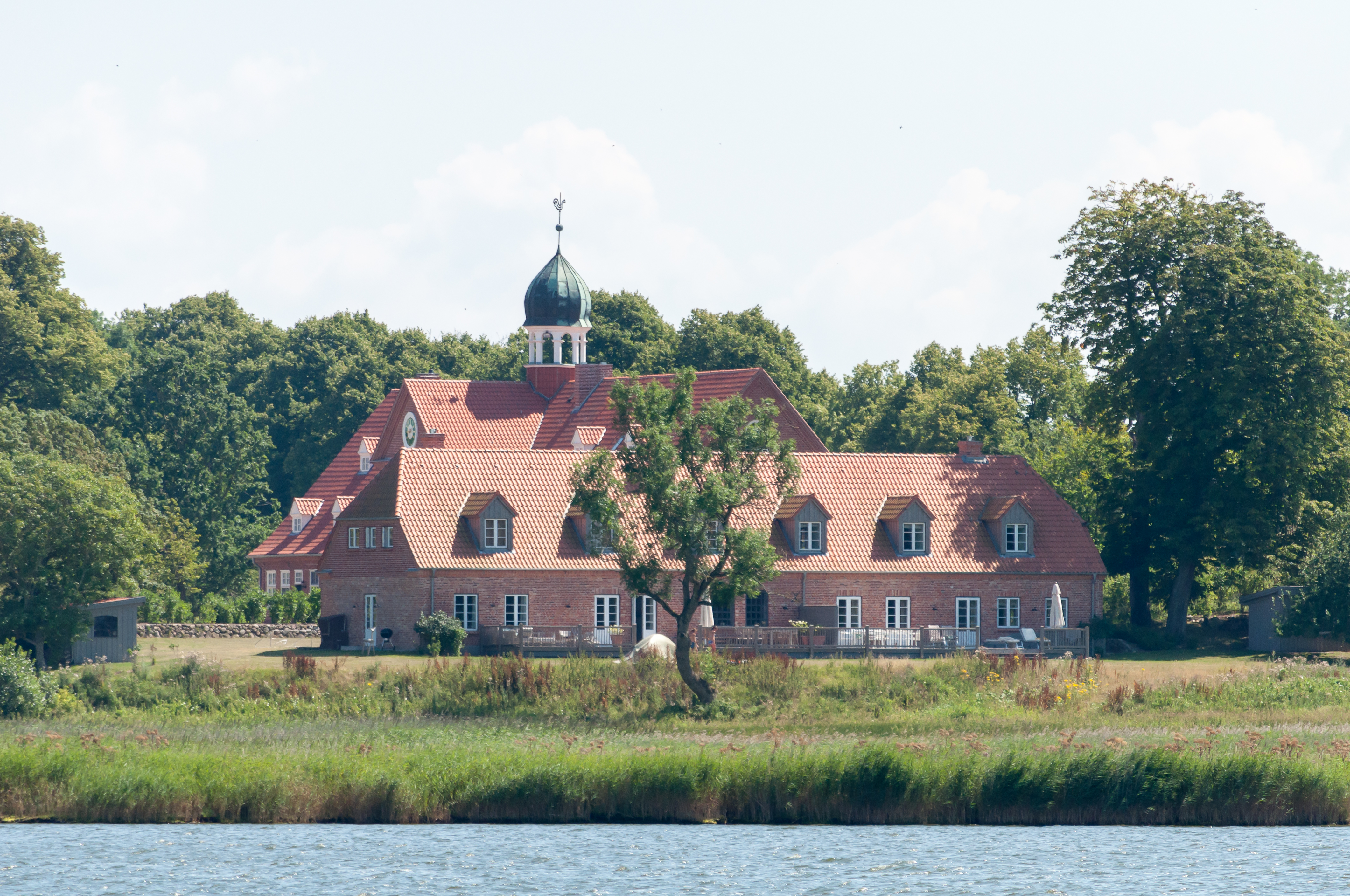 Gut Stubbe in der Gemeinde Rieseby: Das Torhaus von der Angelner Seite der Schlei aus gesehen. This is a photograph of an architectural monument. .2